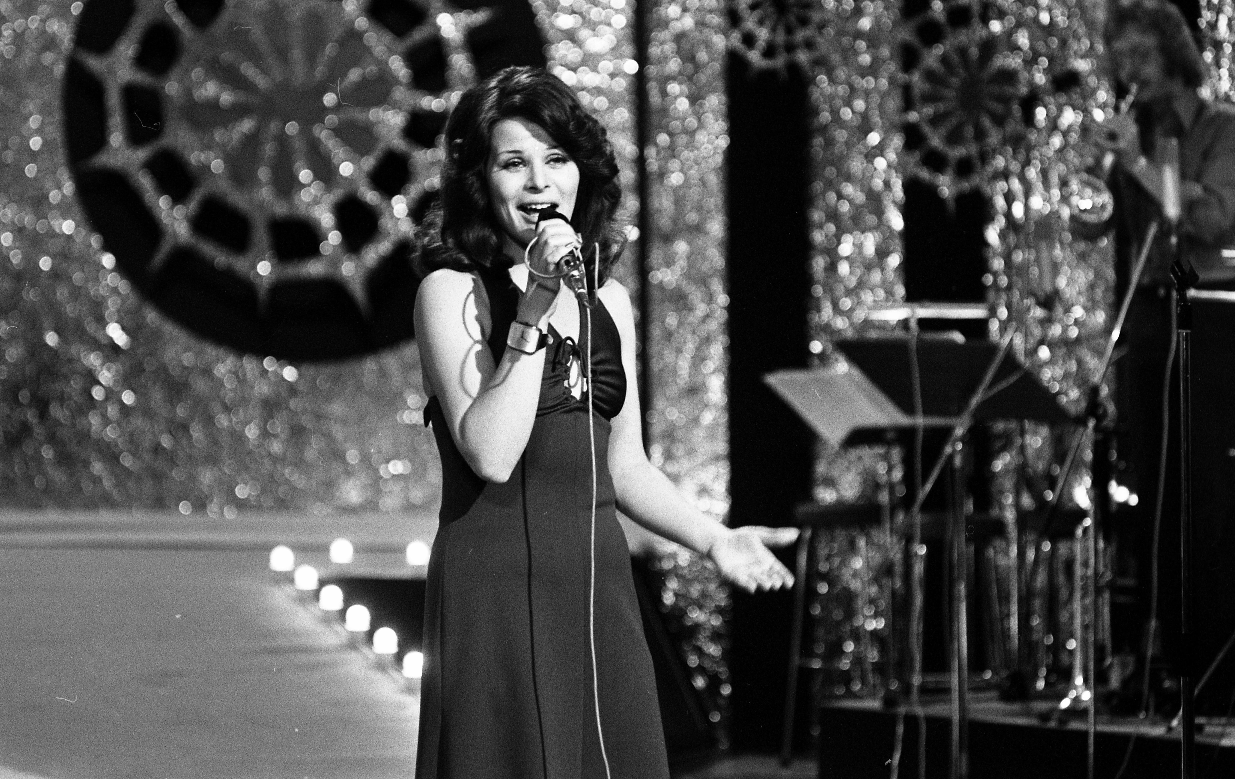 Melodi Grand Prix, norsk finale i TV-studio 1 NRK, 1974. Fra generalprøven. Foto: Petter R. Iversen. Arkivref.: PA-0797_U_7631_014_013